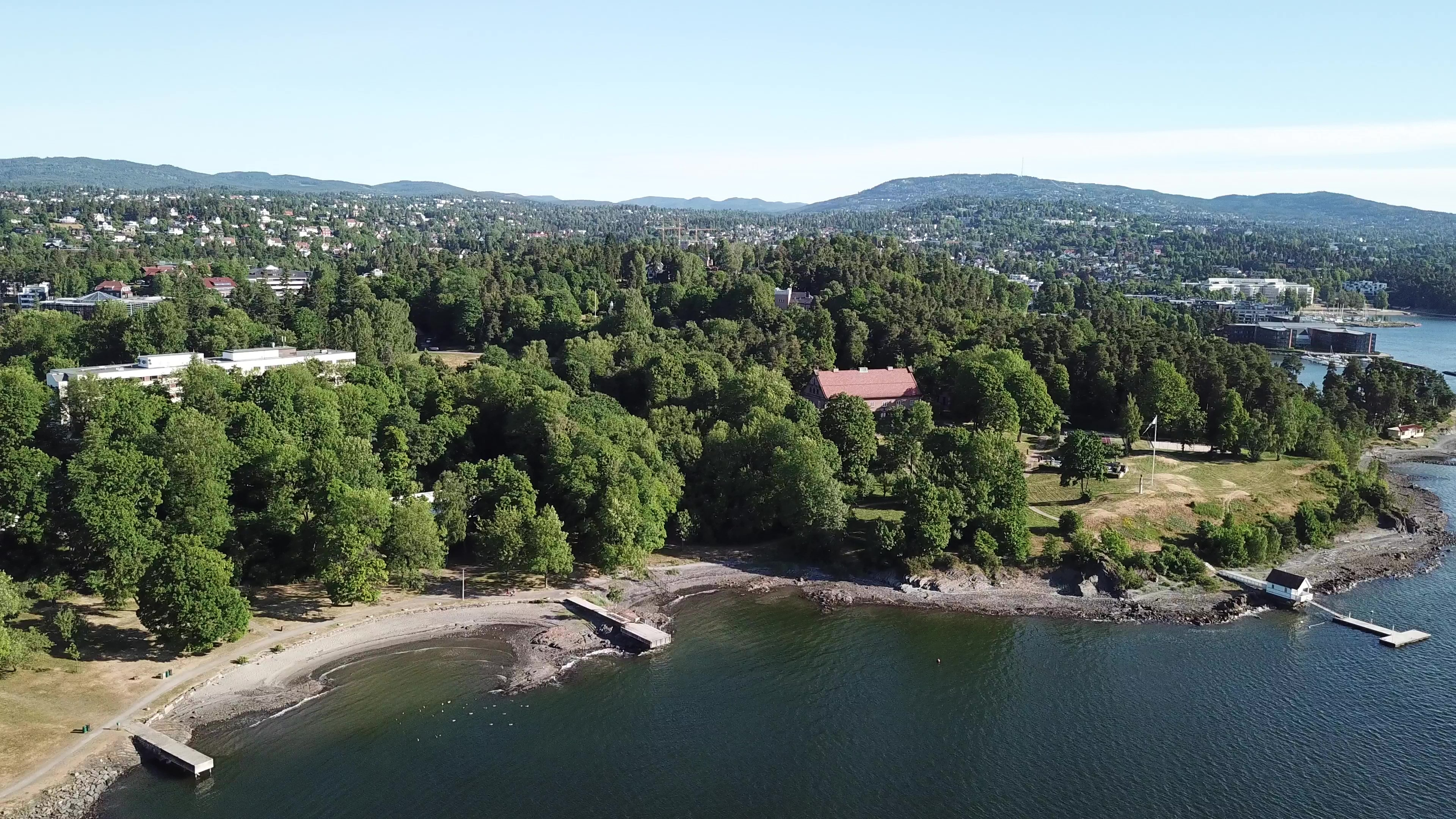 Fornebukta badestrand og brygger. Hotell og Munkebakken.